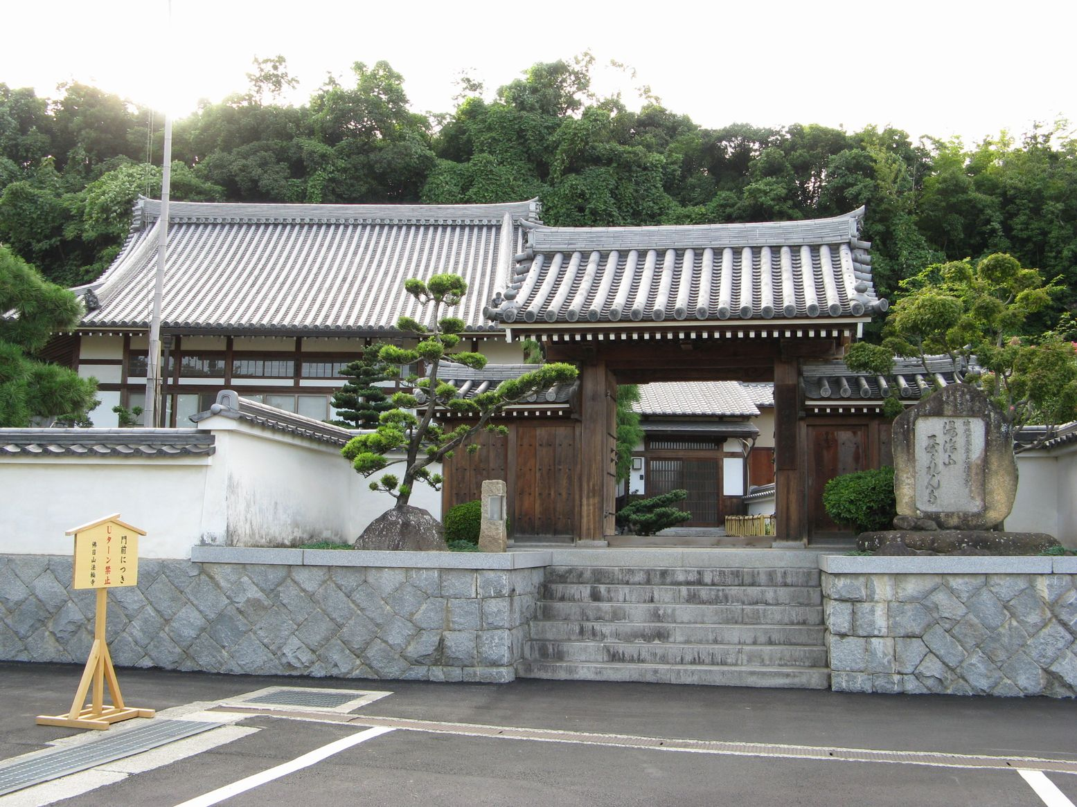 法輪寺 (姫路市)